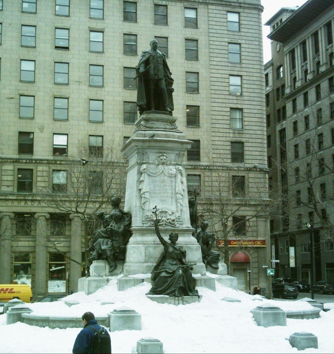 Monument à Édouard VII (1914), sculpture de Louis-Philippe Hébert, au Square Phillips, à Montréal